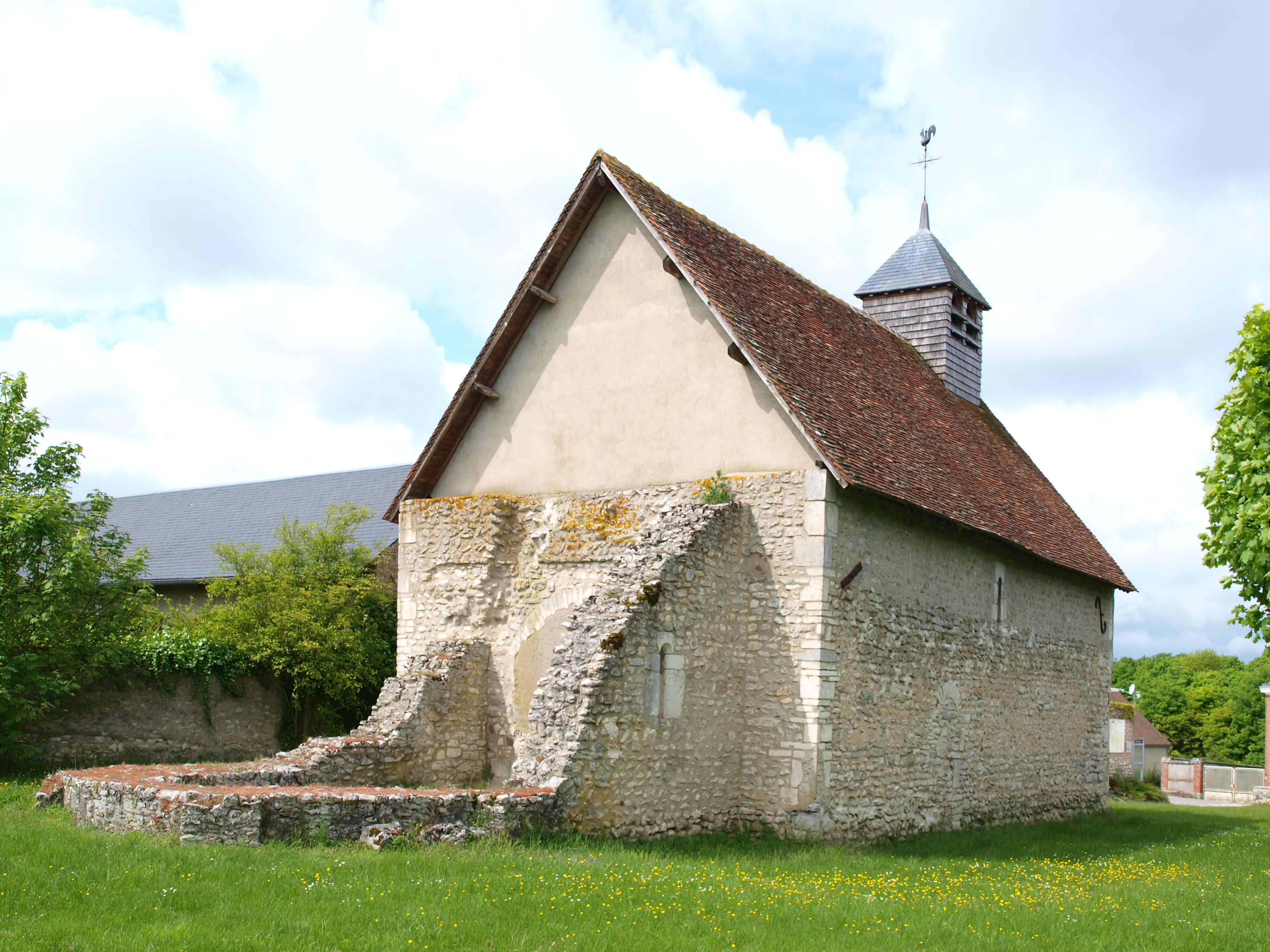 Cortrat (Loiret, France) ; l'église Saint-Martin